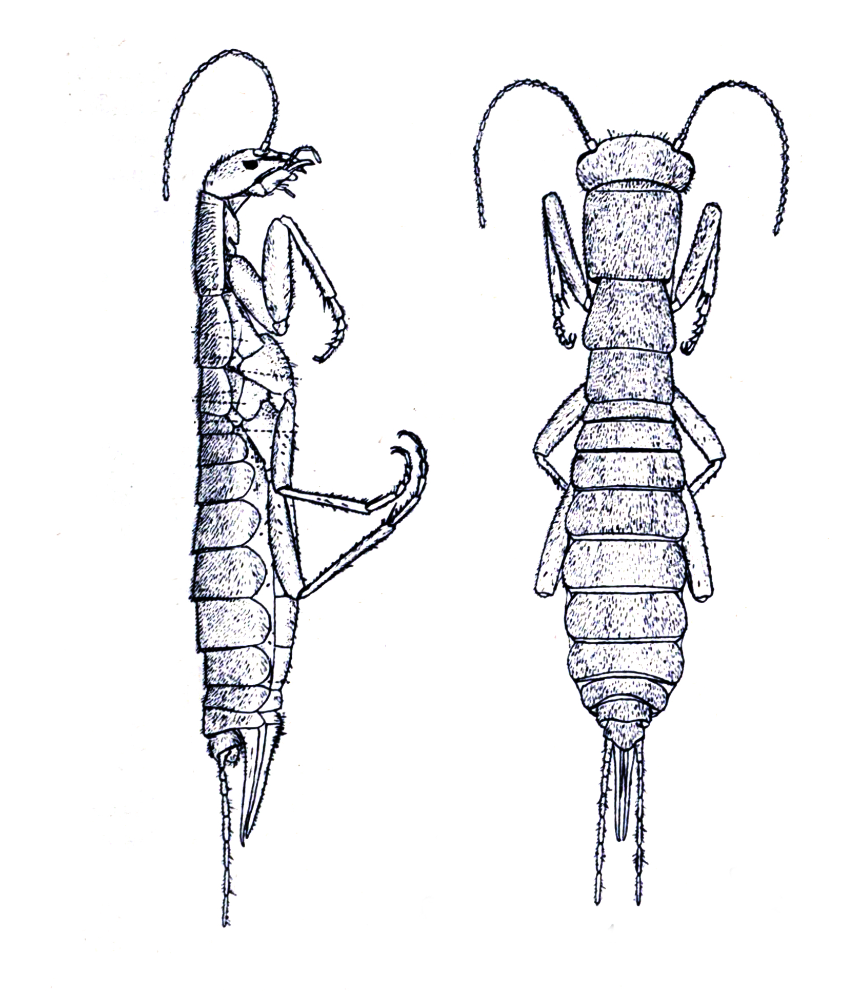 Grylloblatta campodeiformis